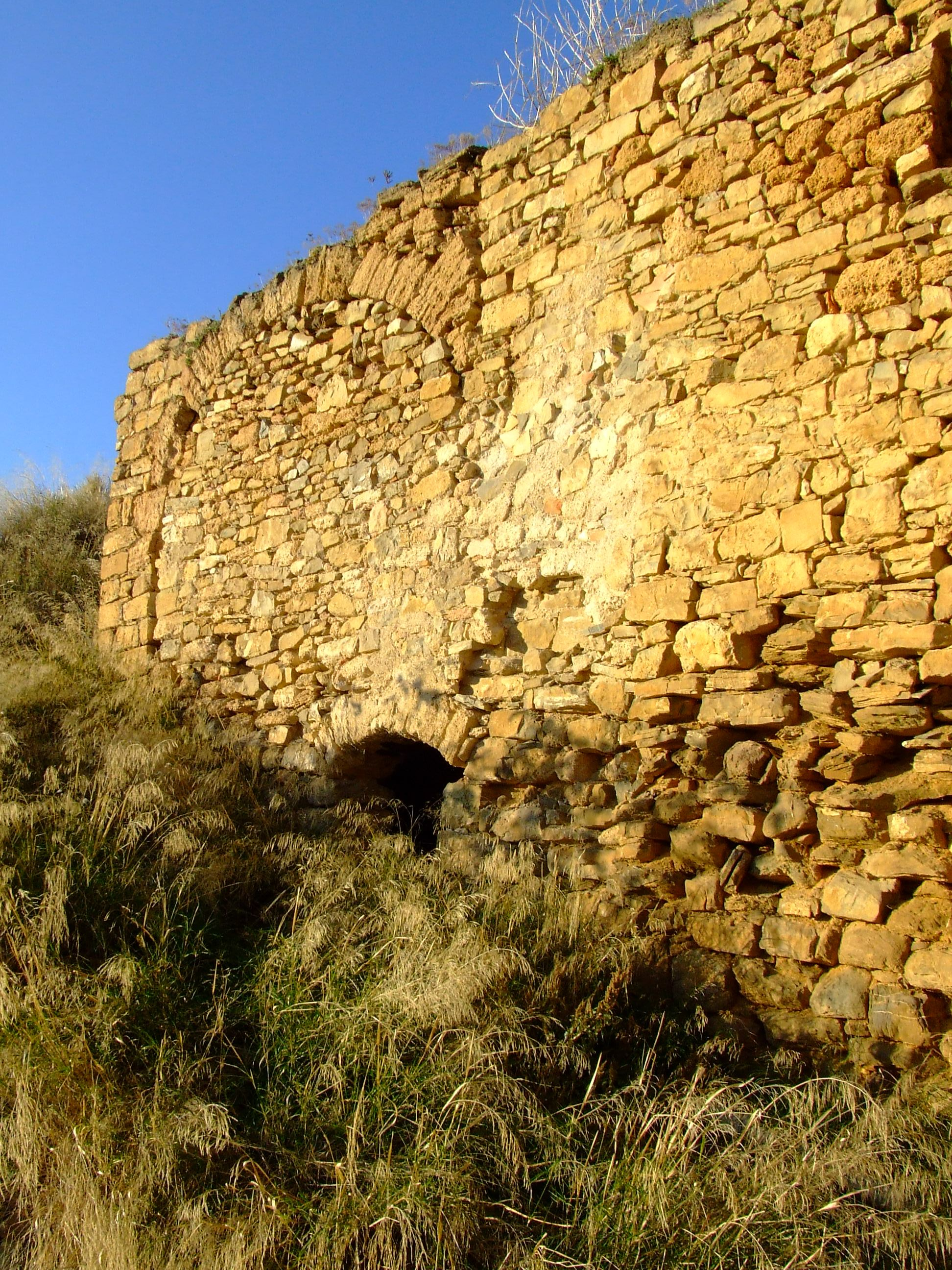 Fragment de murada del castell de Basturs (Orcau, Isona i Conca Dellà, Pallars Jussà)